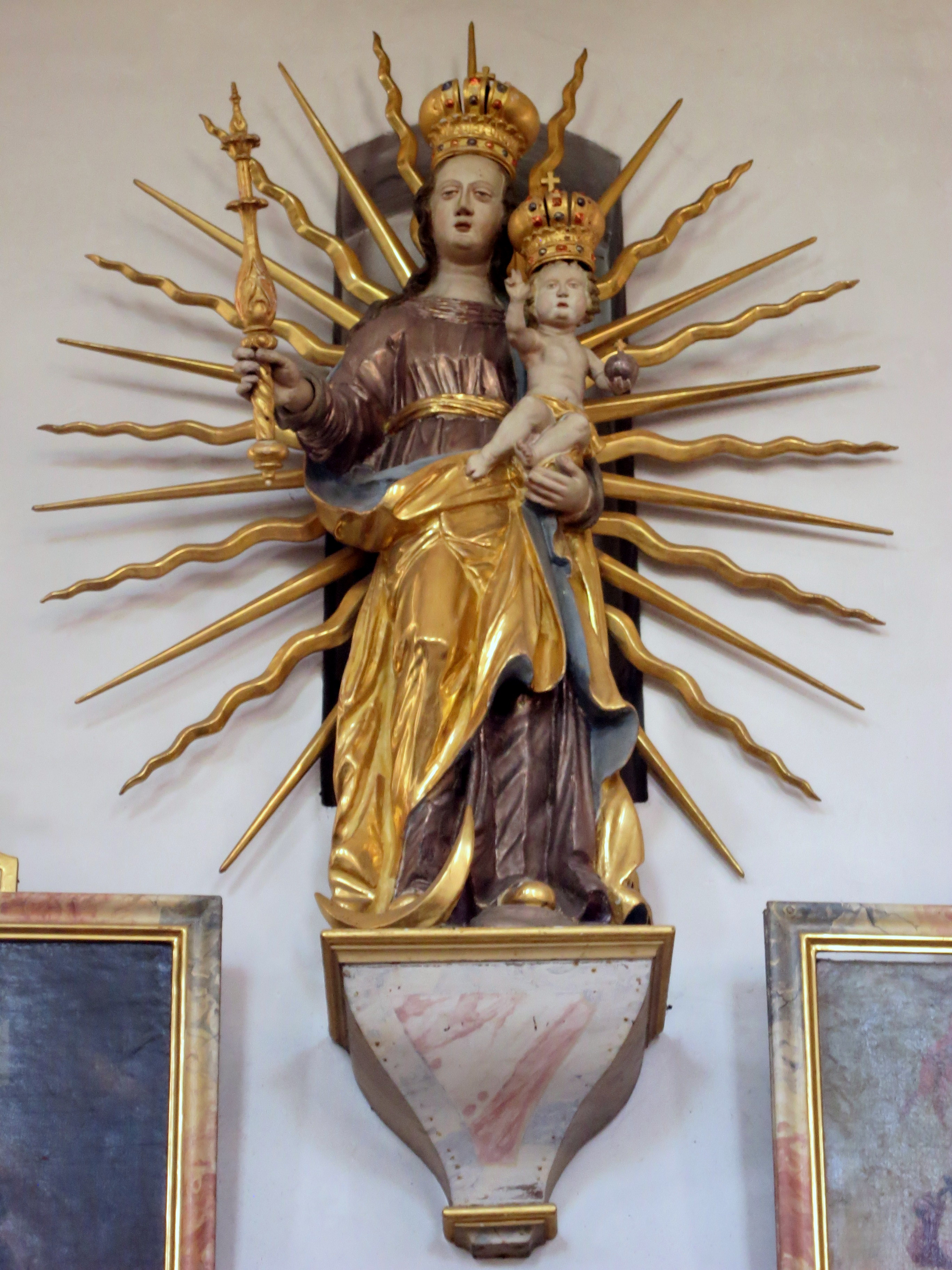 Katholische Pfarrkirche St. Vitus im OT Göbelsbach der Stadt Pfaffenhofen an der Ilm, Landkreis PAF.